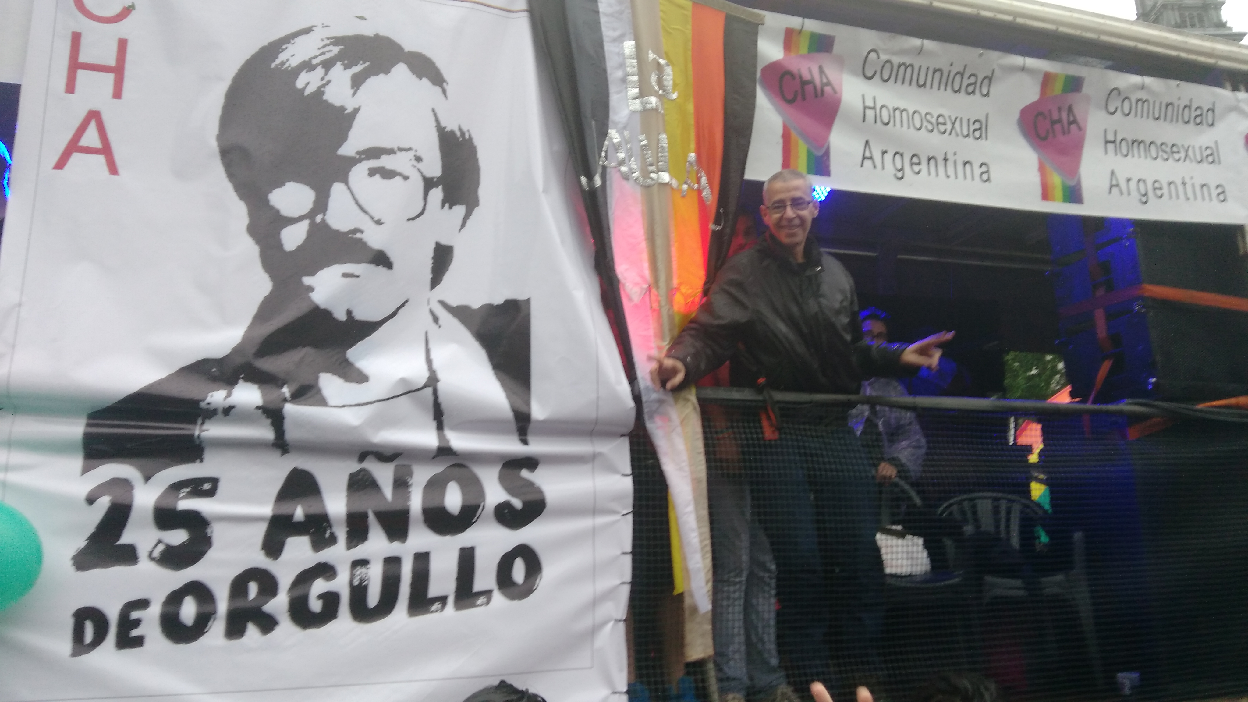 Marcha del orgullo Buenos Aires